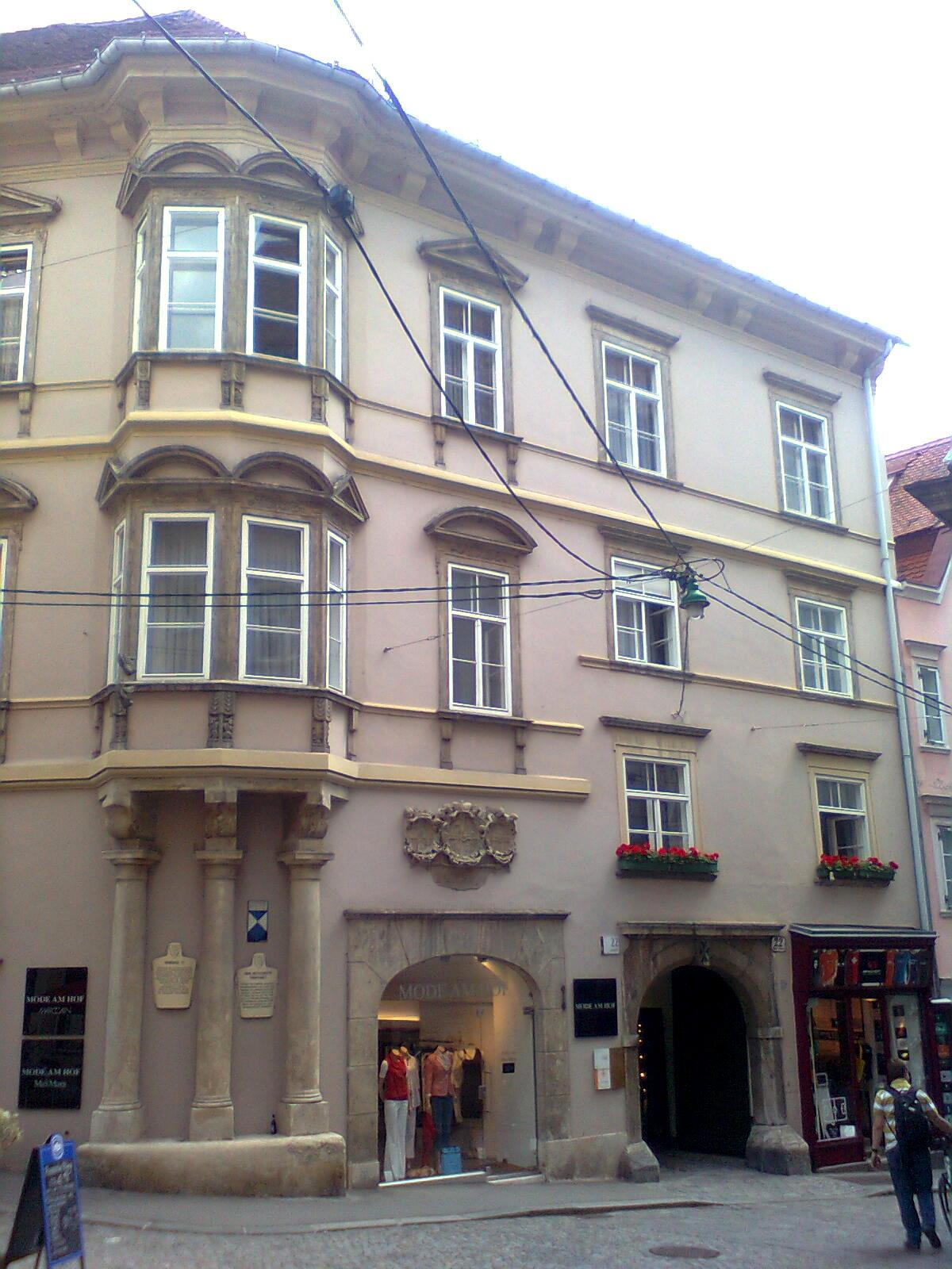 Deutschritterordenshaus Außenansicht Graz, Hofgasse 2, Österreich